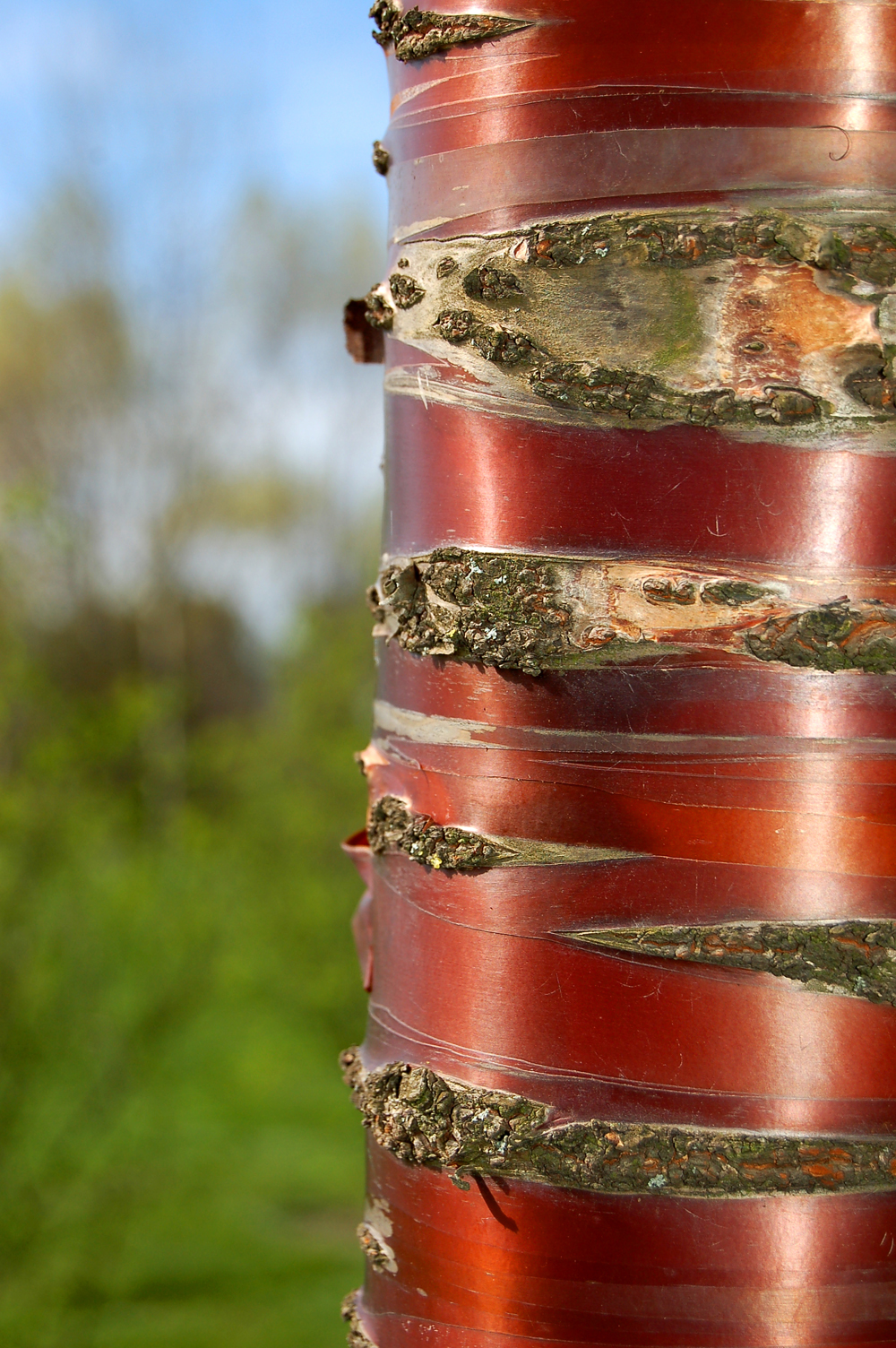 Japanischer Kirschbaum in den Gärten der Welt